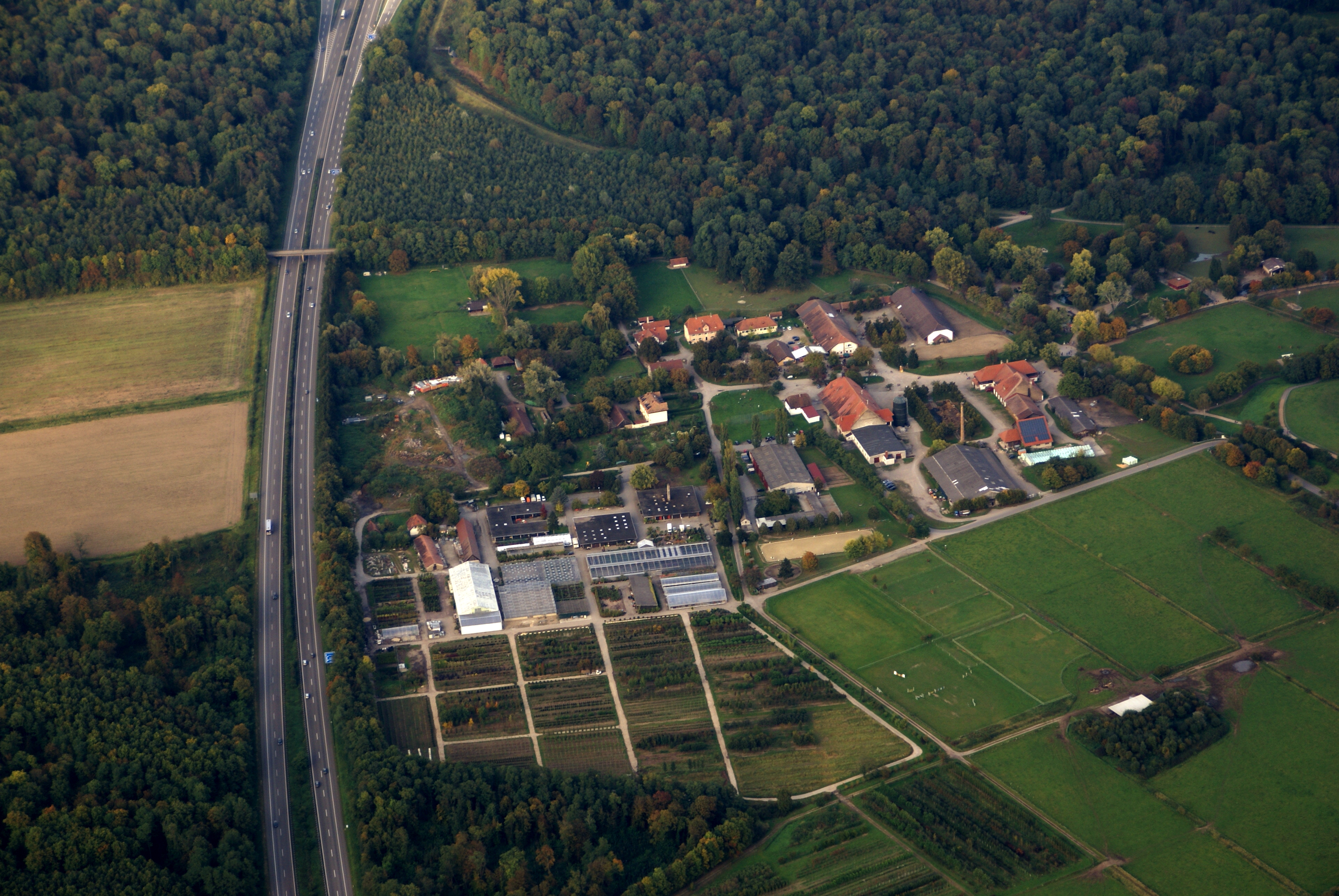 Luftbild vom Mundenhof Freiburg mit Stadtgärtnerei und Autobahn A 5